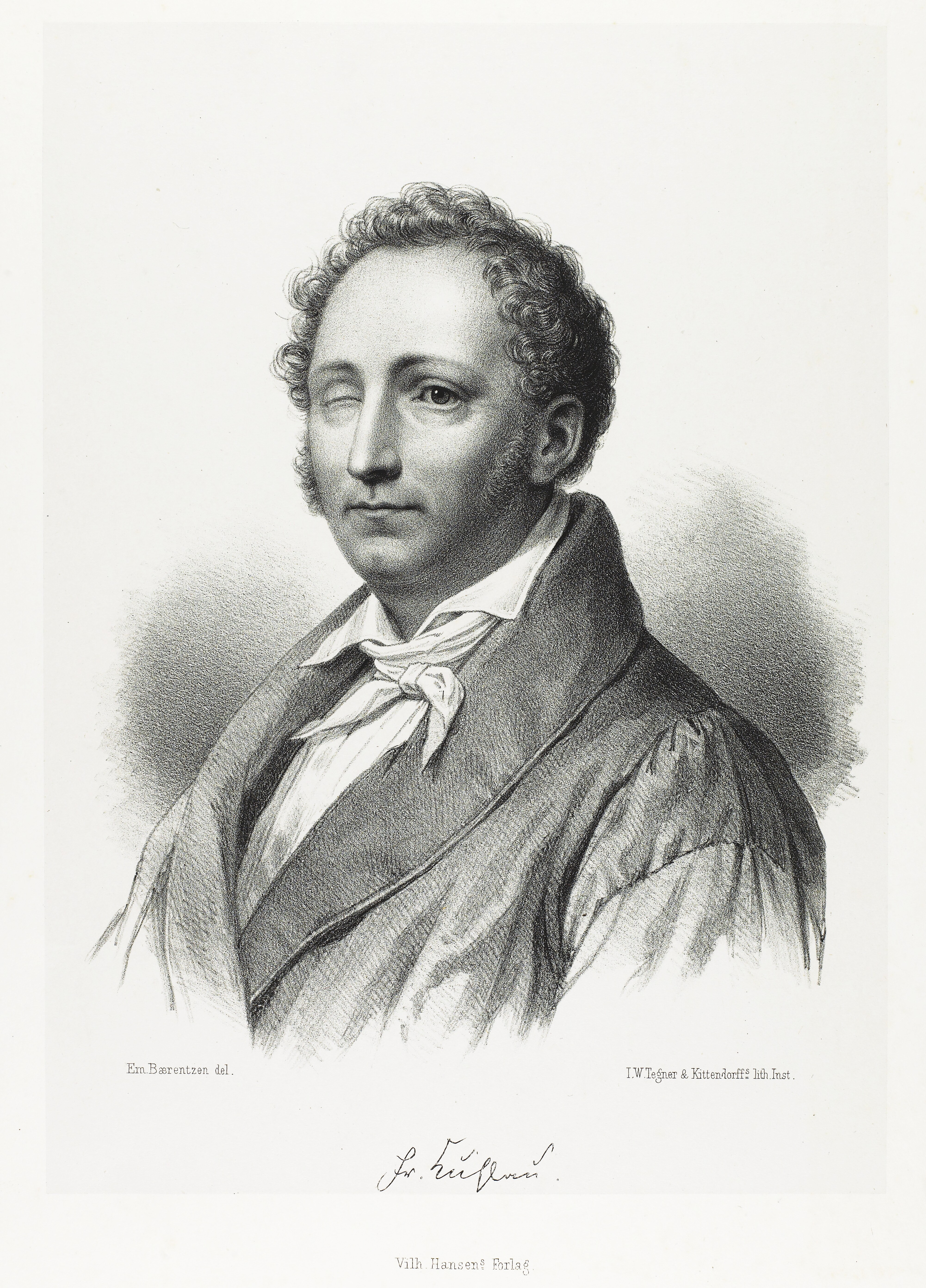 Depicted person: Friedrich Kuhlau